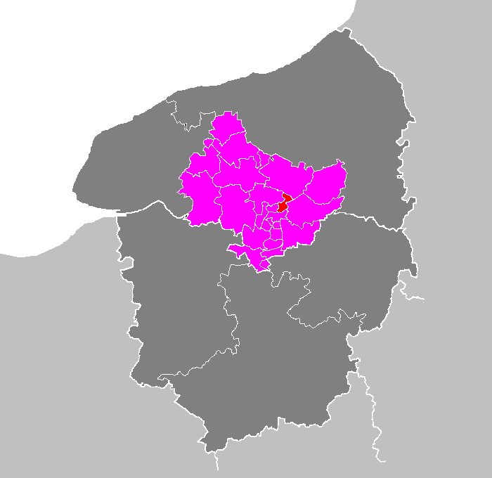 Maps of arrondissements and cantons of France: Arrondissement de Rouen - Canton de Bois-Guillaume.PNG